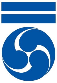 二引両に左三つ巴